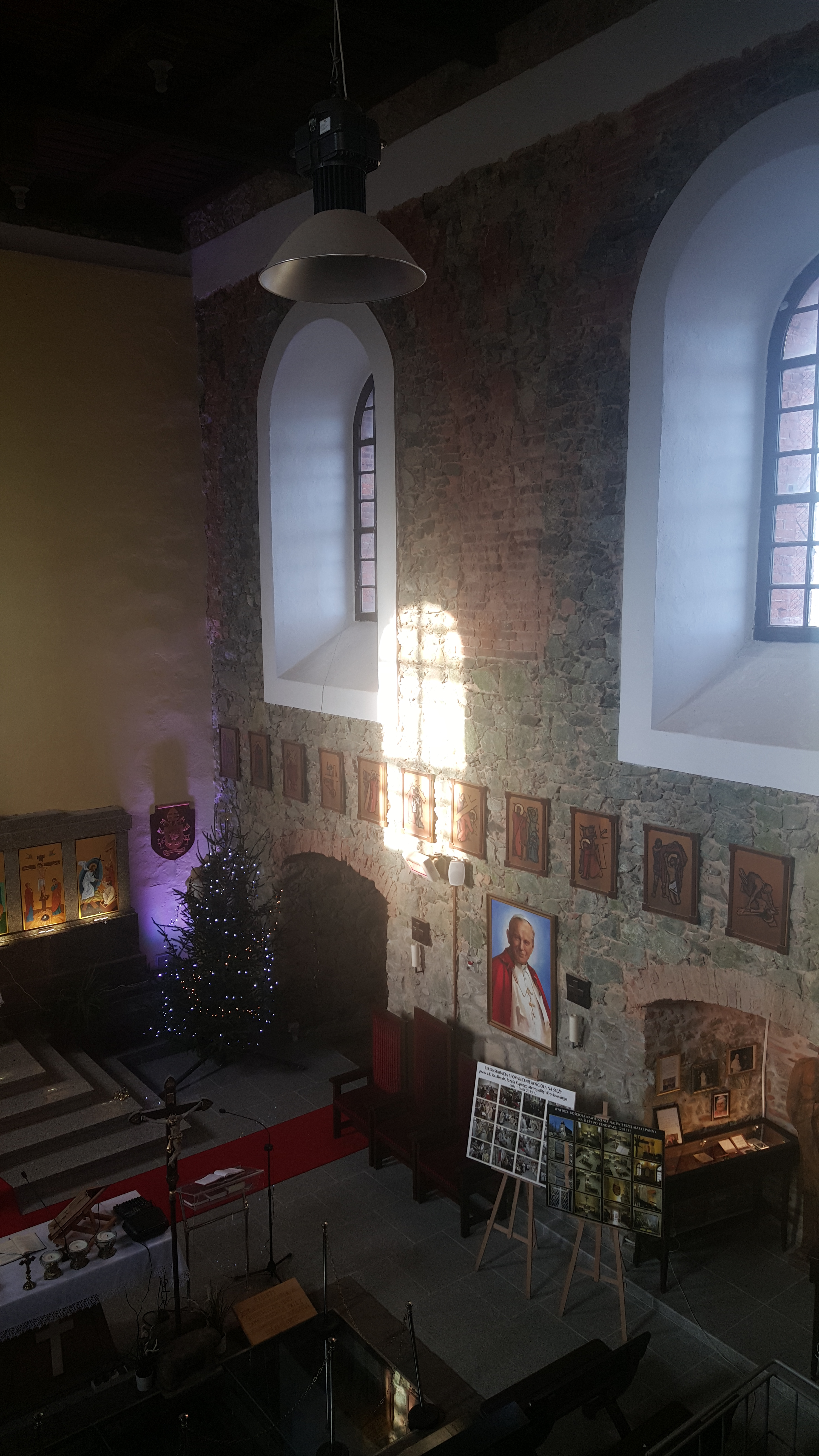 Kościół pw. Nawiedzenia NMP Ślęża - wnętrza